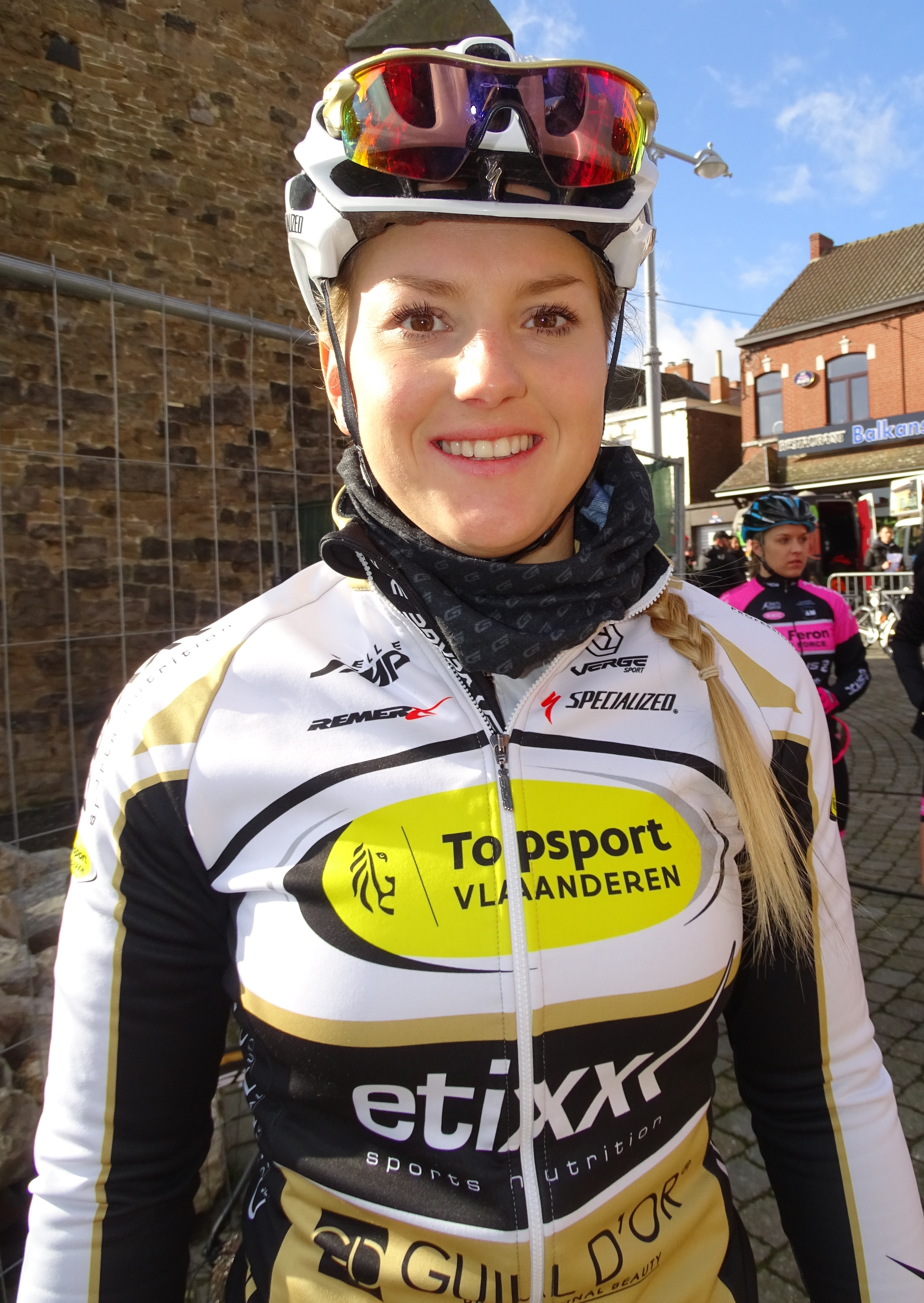 Reportage réalisé le mercredi 2 mars à l'occasion du départ du Samyn des Dames 2016 et du Samyn 2016 à Quaregnon, Belgique.